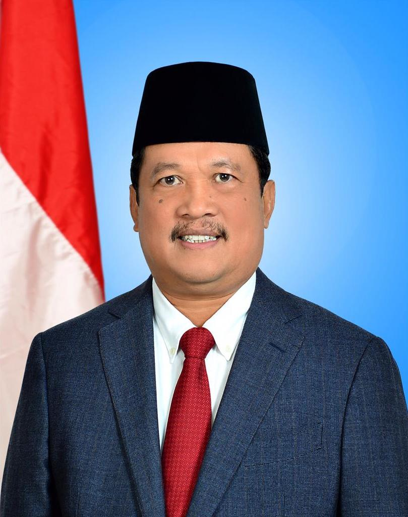 Sakti-Wahyu-Trenggono sebagai Wakil Menteri Pertahanan